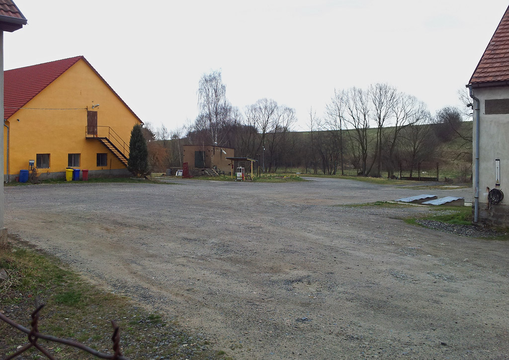 Areál společnosti CUP TOUR Bus, s.r.o., Dubno 36, okres Příbram.